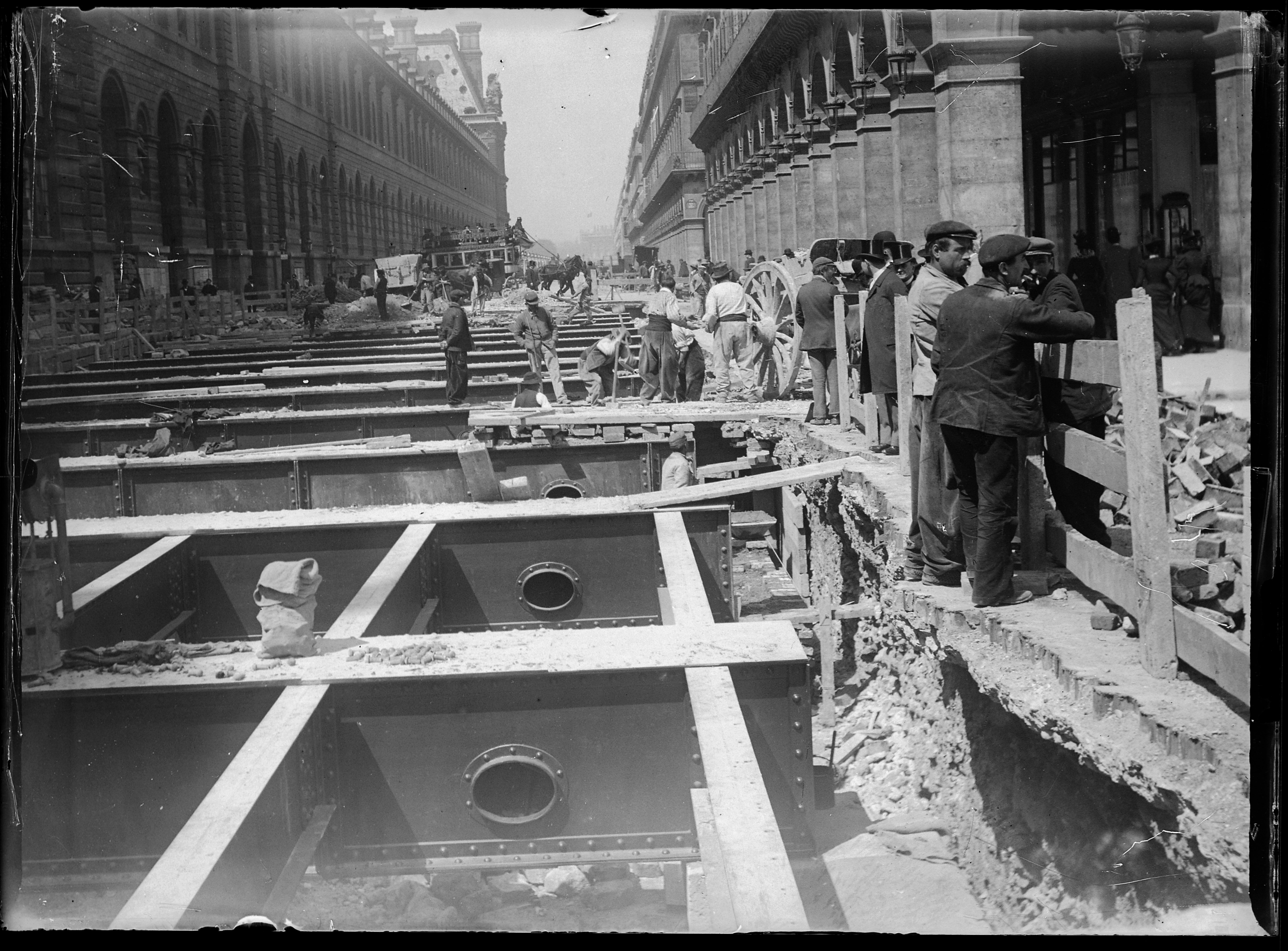 plaque négative au gélatino-bromure d'argent, format 6,5x9 cm. Inscription manuscrite par Eugène Trutat sur l'enveloppe : "Mai 1899 Paris rue de Rivoli travaux du Métropolitain Hermagis"